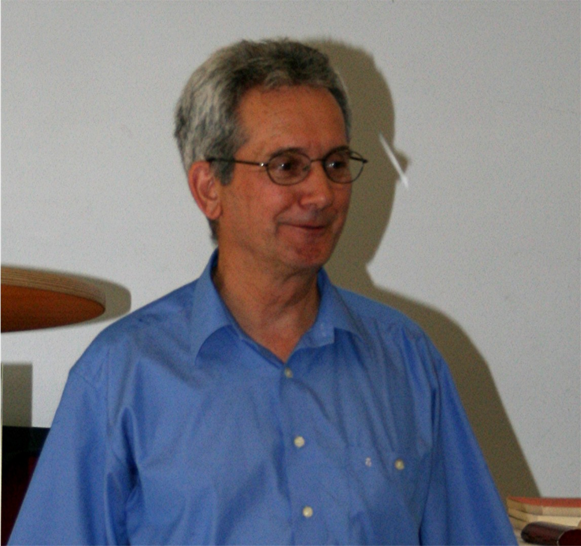 Prof. Dr. Erhard Wielandt